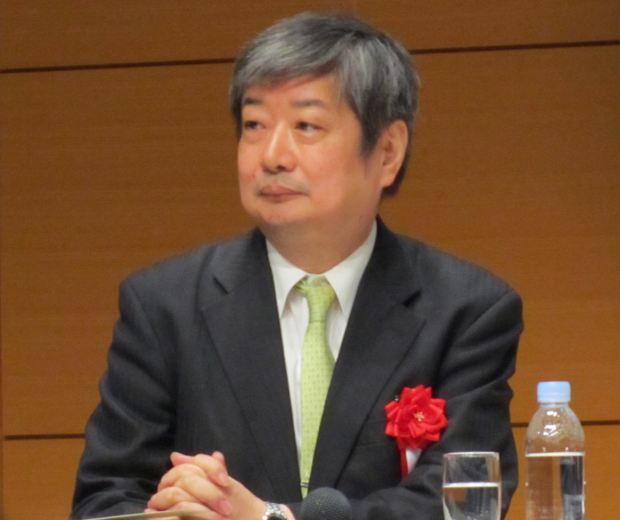 題名：講演中の海渡雄一氏（弁護士、第二東京弁護士会所属、東京共同法律事務所所属） 場所：「饗宴IV」Grand Hall(品川) 日時：2013年12月22日(日)